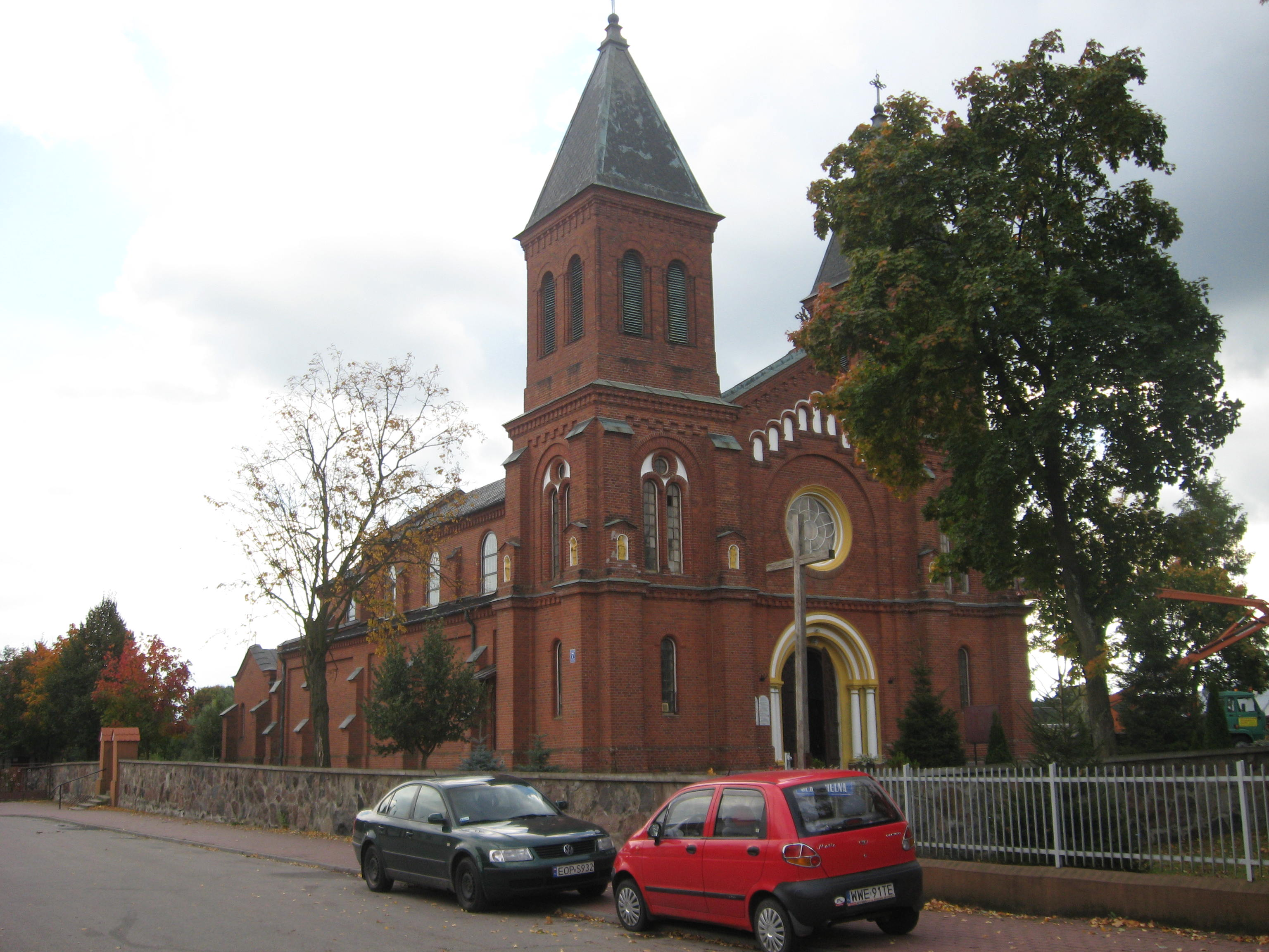 kościół par. p.w. św. Stanisława Biskupa, 1895-1897 Stoczek, Gmina Stoczek